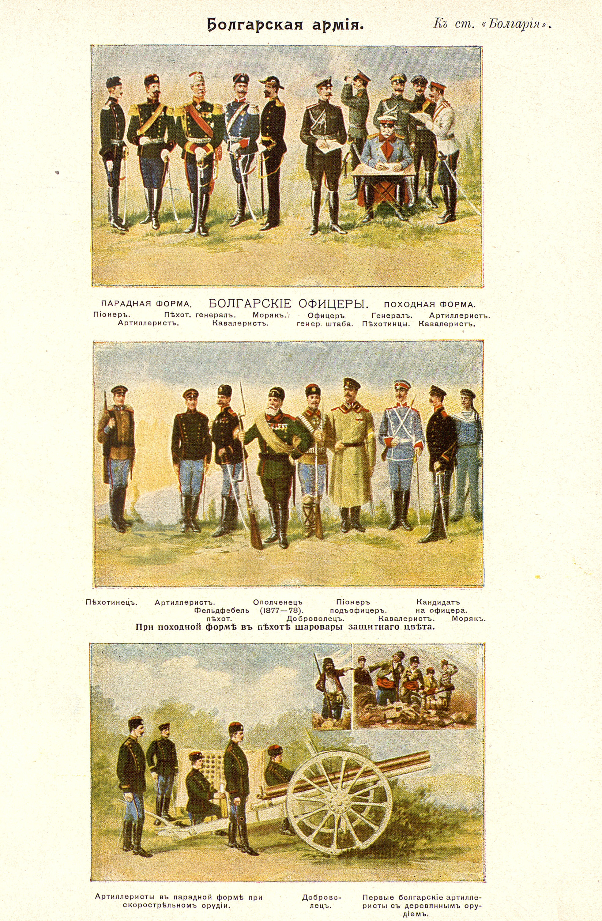 Данное изображение было использовано в статье «Болгария» опубликованной в четвёртом томе «Военной энциклопедии», который был издан книгоиздательским товариществом Ивана Дмитриевича Сытина в 1911 году в столице Российской империи городе Санкт-Петербурге.